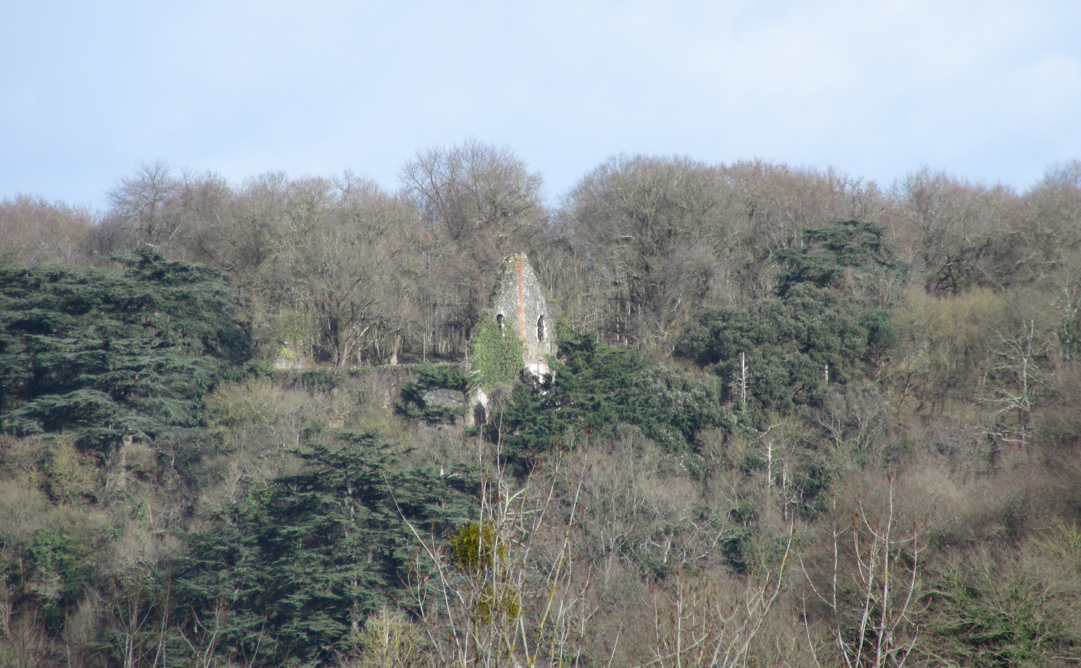 Ruines de Vieille Cour vues du viaduc du Hâvre à Oudon